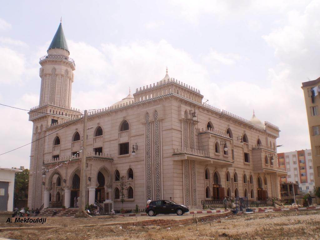 Fierté récente de la ville de Boufarik en Algérie, la mosquée Ali Ibn Abi Taleb a été édifiée en moins de 30 mois.